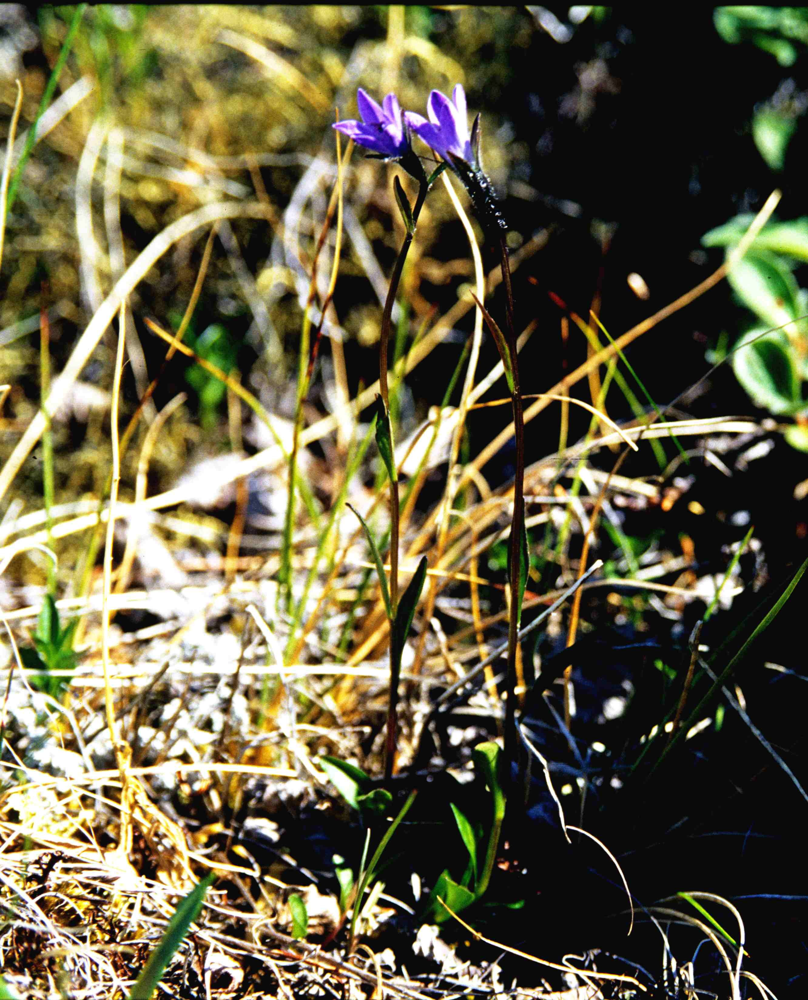 bluebell, Campanula uniflora (Auyuittuq National Park)